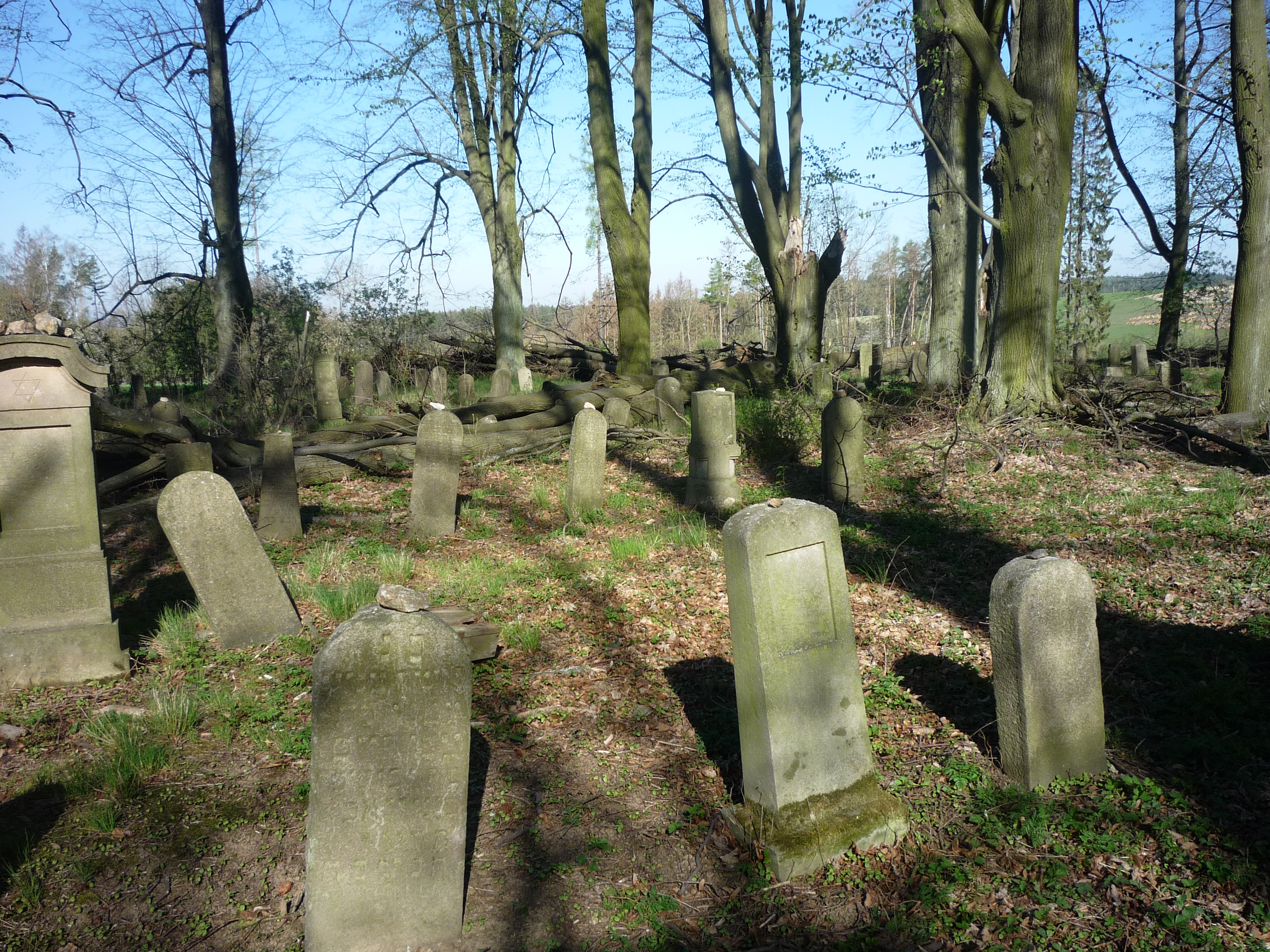 Autor fotografie Jiří Zelenka. Židovský tyfový hřbitov (Havlíčkův Brod). Židovský hřbitov byl vybudován v roce 1917. Pochované osoby pocházejí ze sběrného tábořa židovských uprchlíků z Haliče a Bukoviny. Tento hřbitov se nachází asi 500 m od konce Nového hřbitova. U hlavní silnice 38. - (asi 200 m severozápadně) směrem na Prahu. Havlíčkův Brod. Kraj Vysočina. Czech Republic.